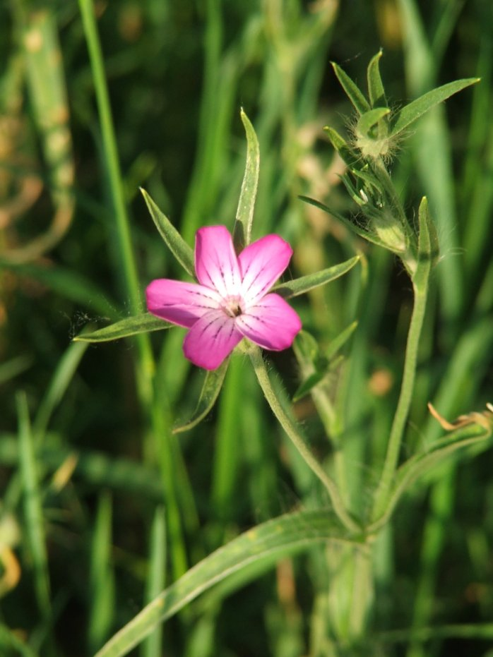 Konkoly